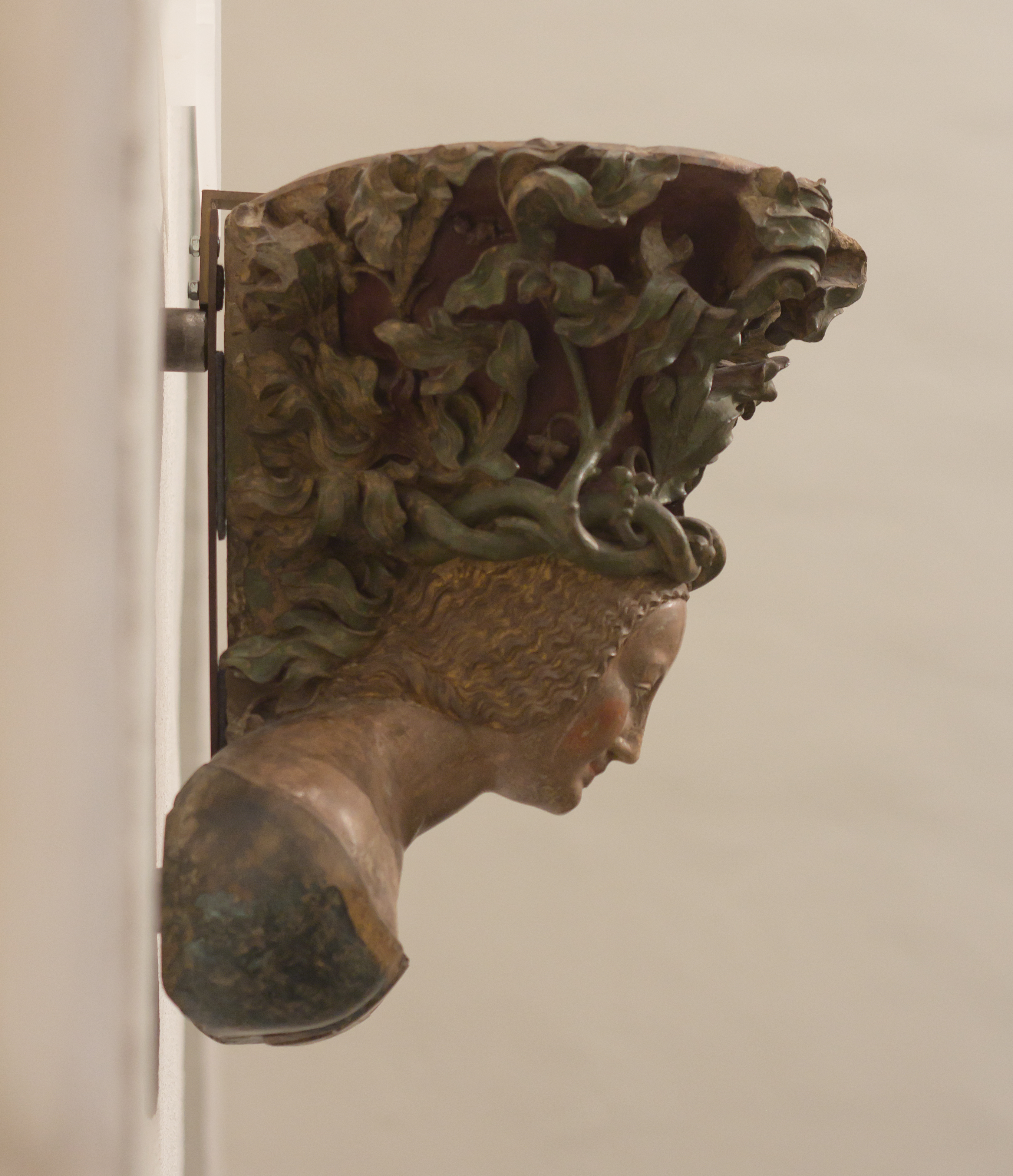 Museum Schnütgen, Parlerbüste Inv. Nr. K127